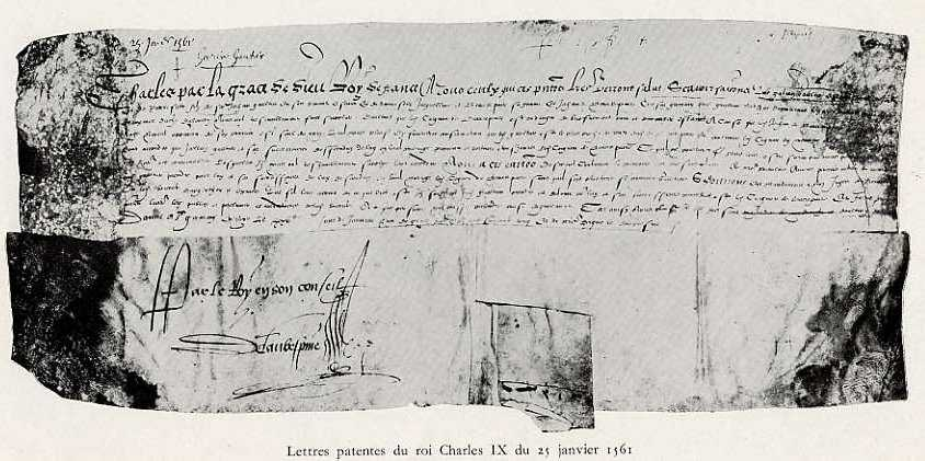 Lettres patentes du roi Charles IX données à St-Germain-en-Laye le 25 janvier 1561